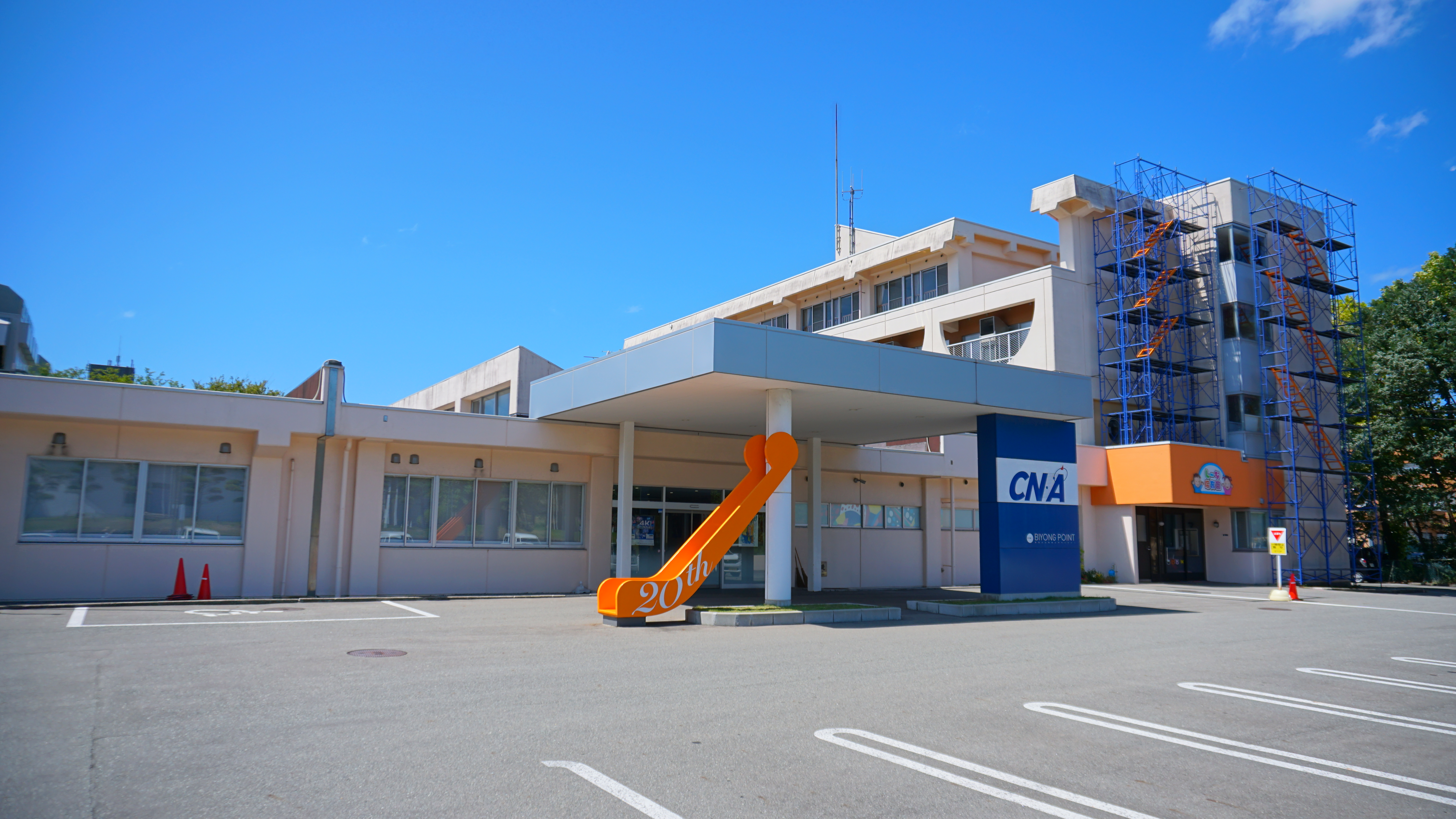 秋田ケーブルテレビ本社（秋田市八橋南）